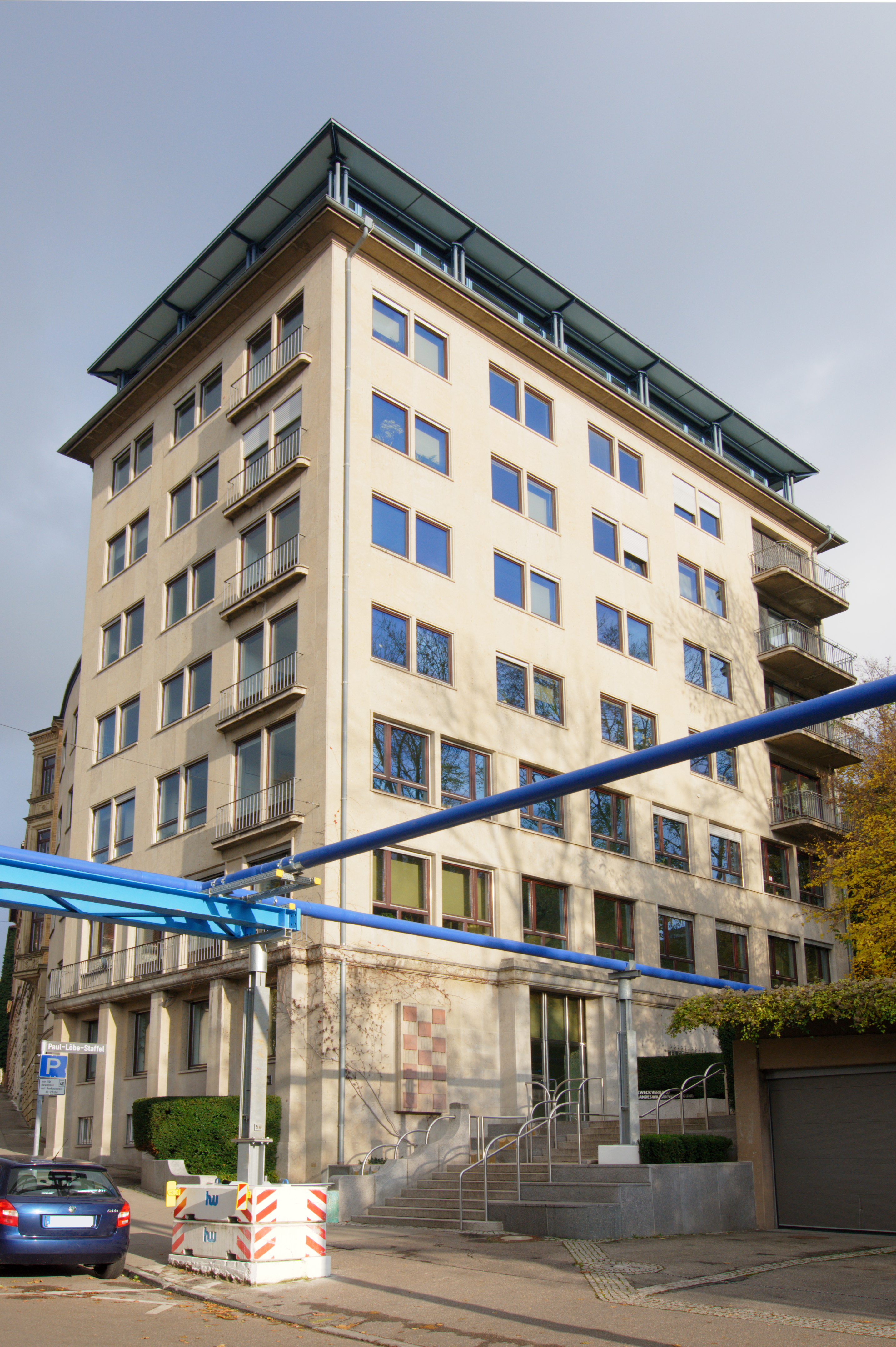 Beim Haus der Stuttgarter Landeswasserversorgung in der Schützenstraße 4 gab es im November 2013 einen Streit um die Höhe der Entschädigung, die die Bahn für die Untertunnelung des Gebäudes zahlen sollte.